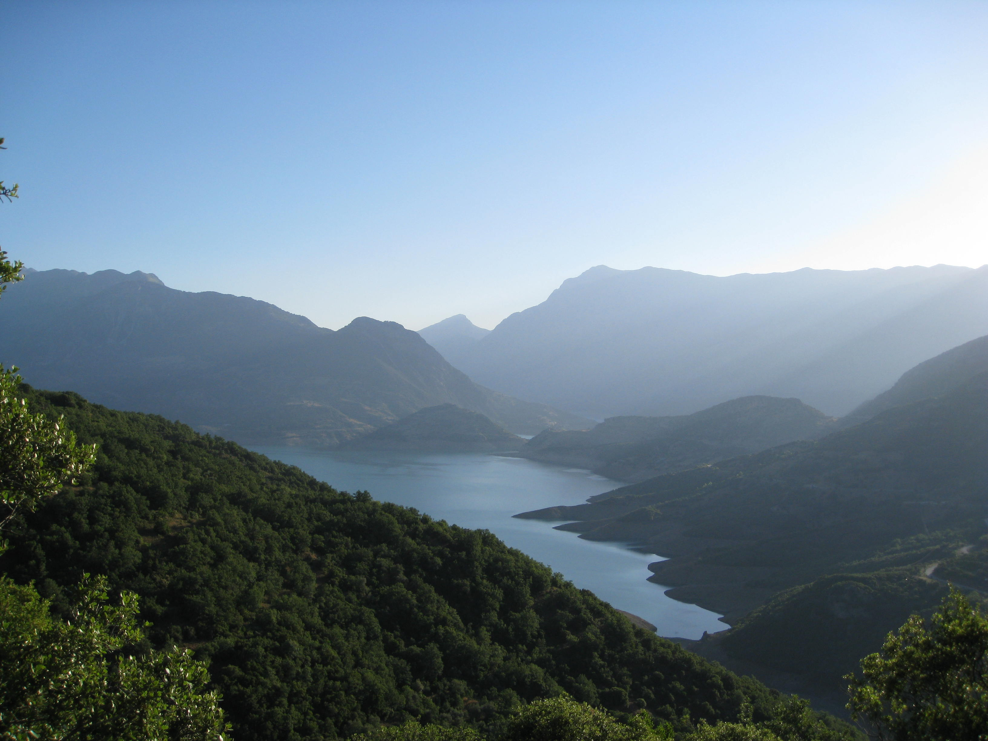 Θέα από τον Άβορο προς το βορρά όπου διακρίνεται το βουνό Γκιώνα και η λίμνη του Μόρνου που τροφοδοτεί με νερό την Αθήνα.